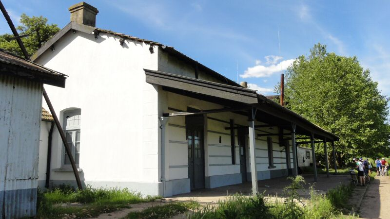 Estación Chas, del ramal Altamirano - Las Flores del FCGR (clausurado). En la actualidad el edificio principal funciona como delegación policial y sala del 1ros. auxilios, mientras que, las demás dependencias se encuentran usurpadas.